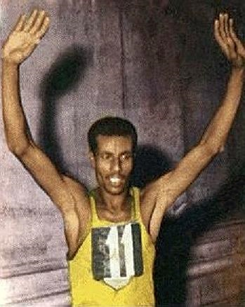 Abebe Bikila (1964), 'Campioni dello Sport 1966 - 1967', Panini figurina n°42.